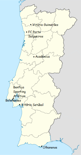 Carte des clubs participants du championnat du portugal de football de première division 1943-1944